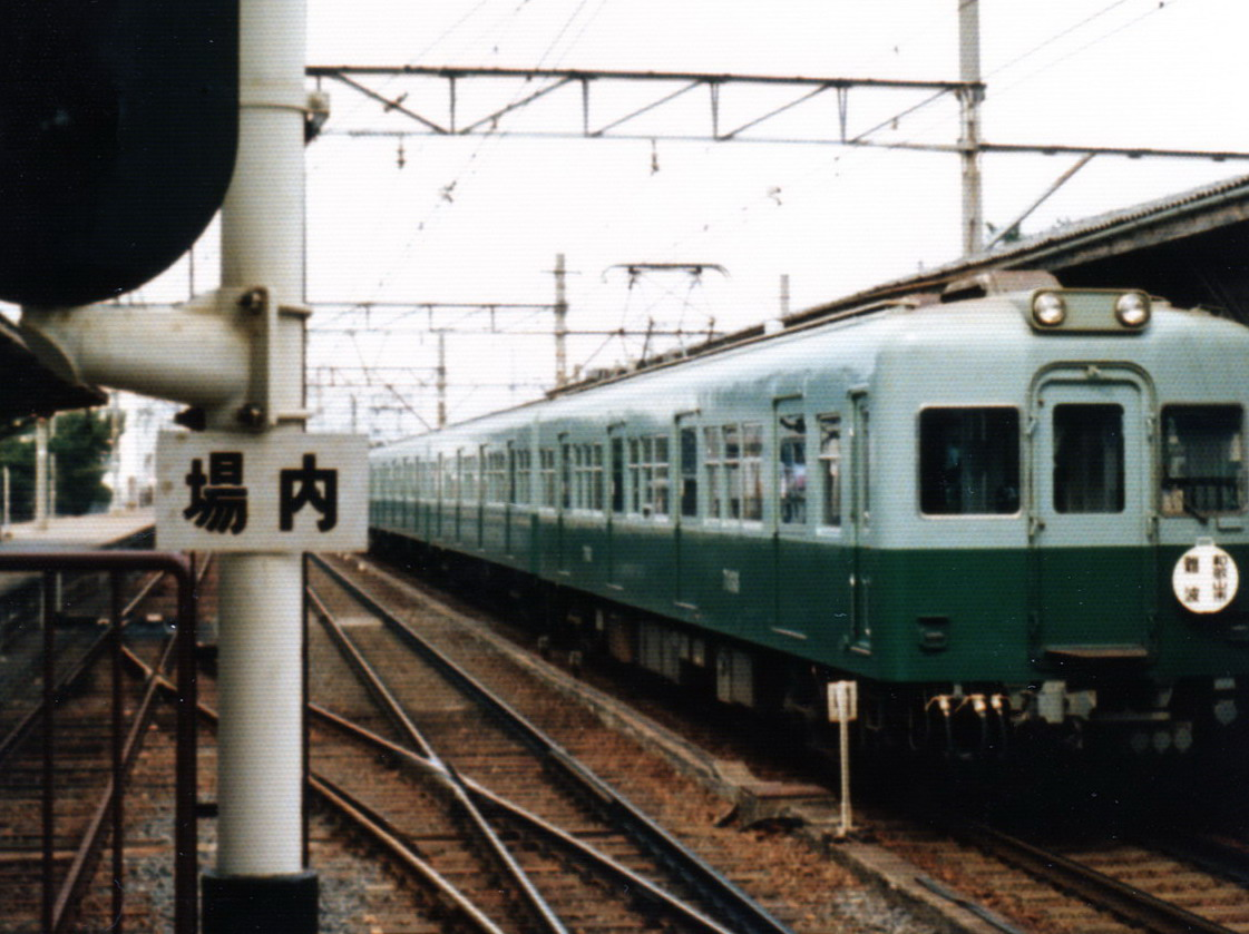 非冷房・旧塗装時代の7000系（1987年頃浜寺公園駅にて撮影）